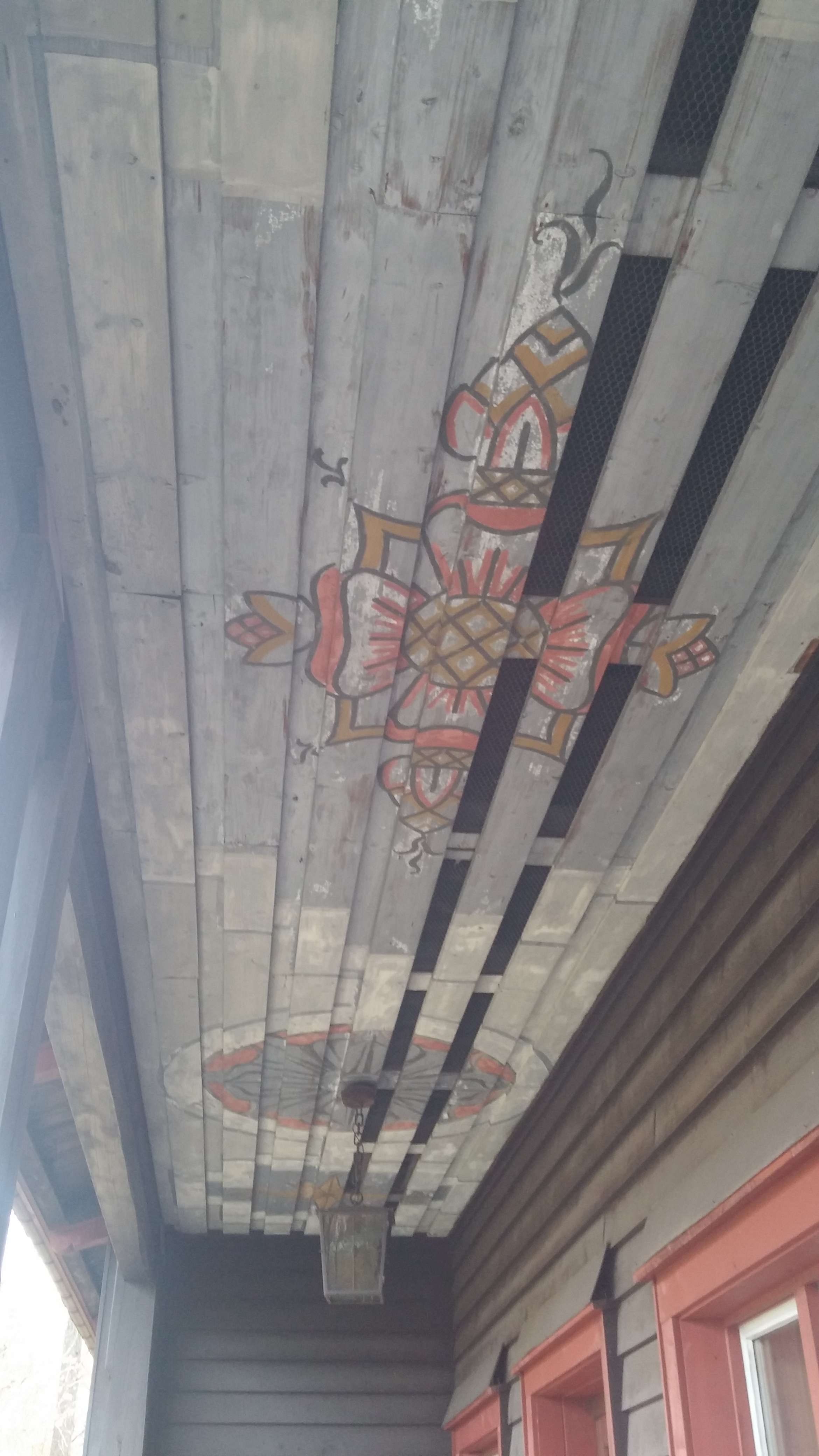 Offisersmessen Casino i Grefsrudleiren ved Holmestrand, bygget av tyskerne under andre verdenskrig, også benyttet til utdannelse av frontkjempere og hirdens vaktmannskaper til fangeleire